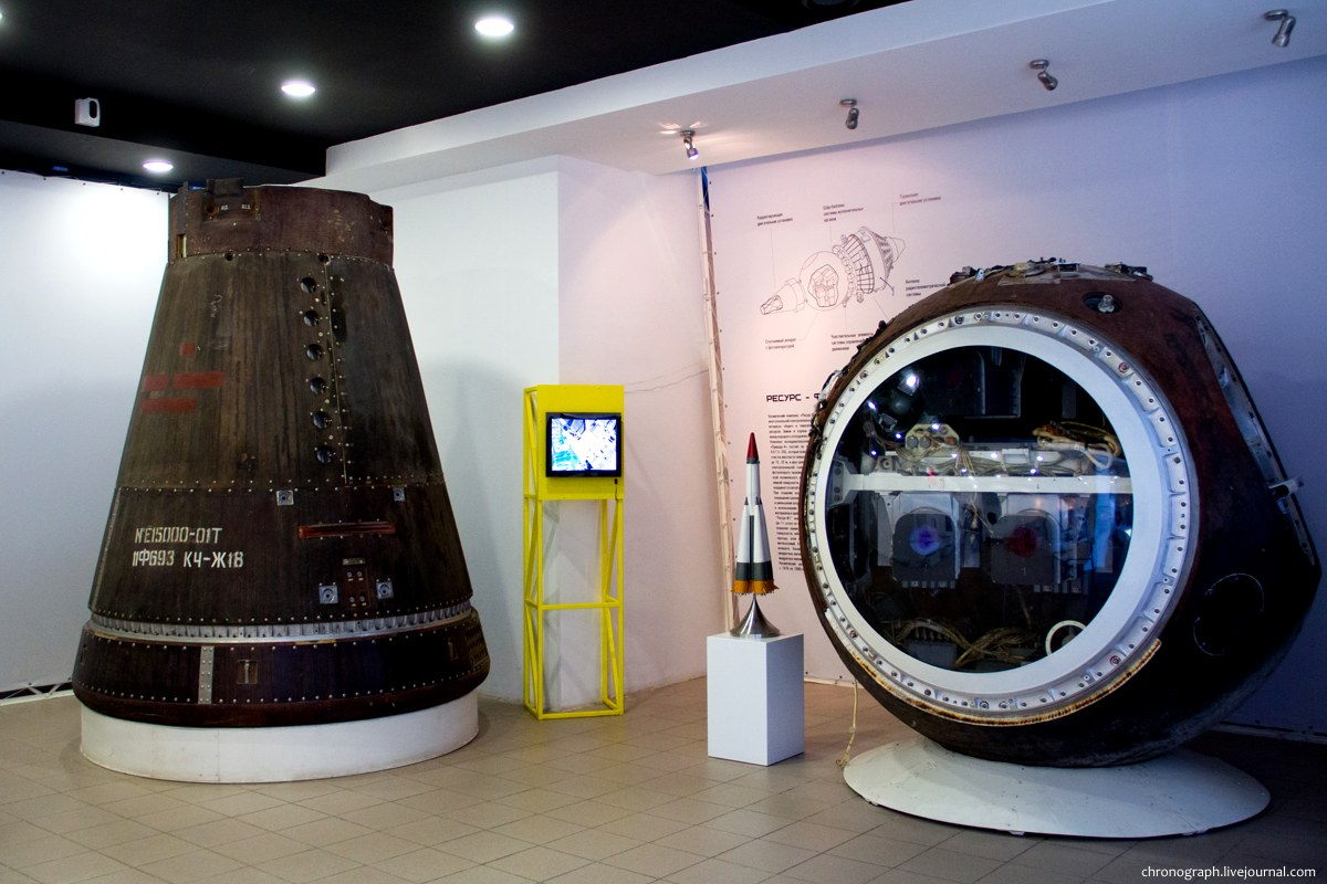 Слева - космический аппарат "Янтарь—2К", предназначенный для получения фотоснимков земной поверхности с последующей доставкой информации в заданный полигон посадки с помощью капсул и спускаемого аппарата. Справа - космический комплекс "Ресурс—Ф1", предназначенный для общего и тематического картографирования, изучения природных ресурсов Земли и охраны окружающей среды.